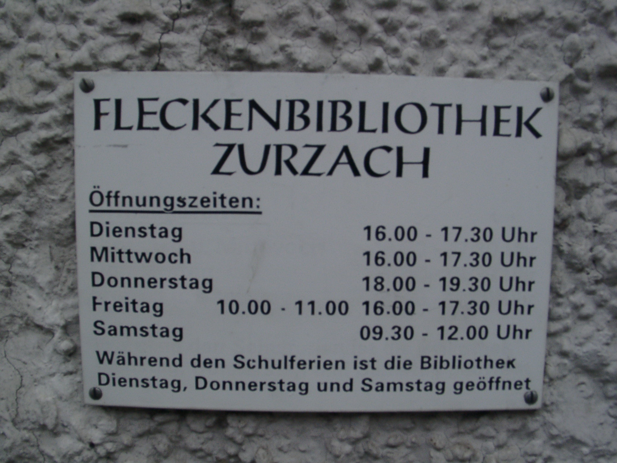 Fleckenbibliothek Zurzach